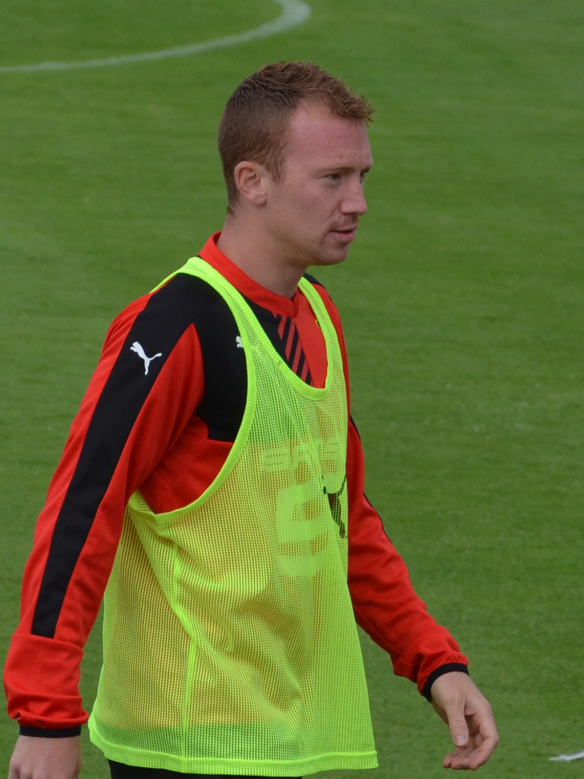 Photographie prise lors du match opposant le Stade rennais au Havre AC en amical au stade Paul-Audrin de Dinard le 8 juillet 2015. Ici, Christian Brüls.